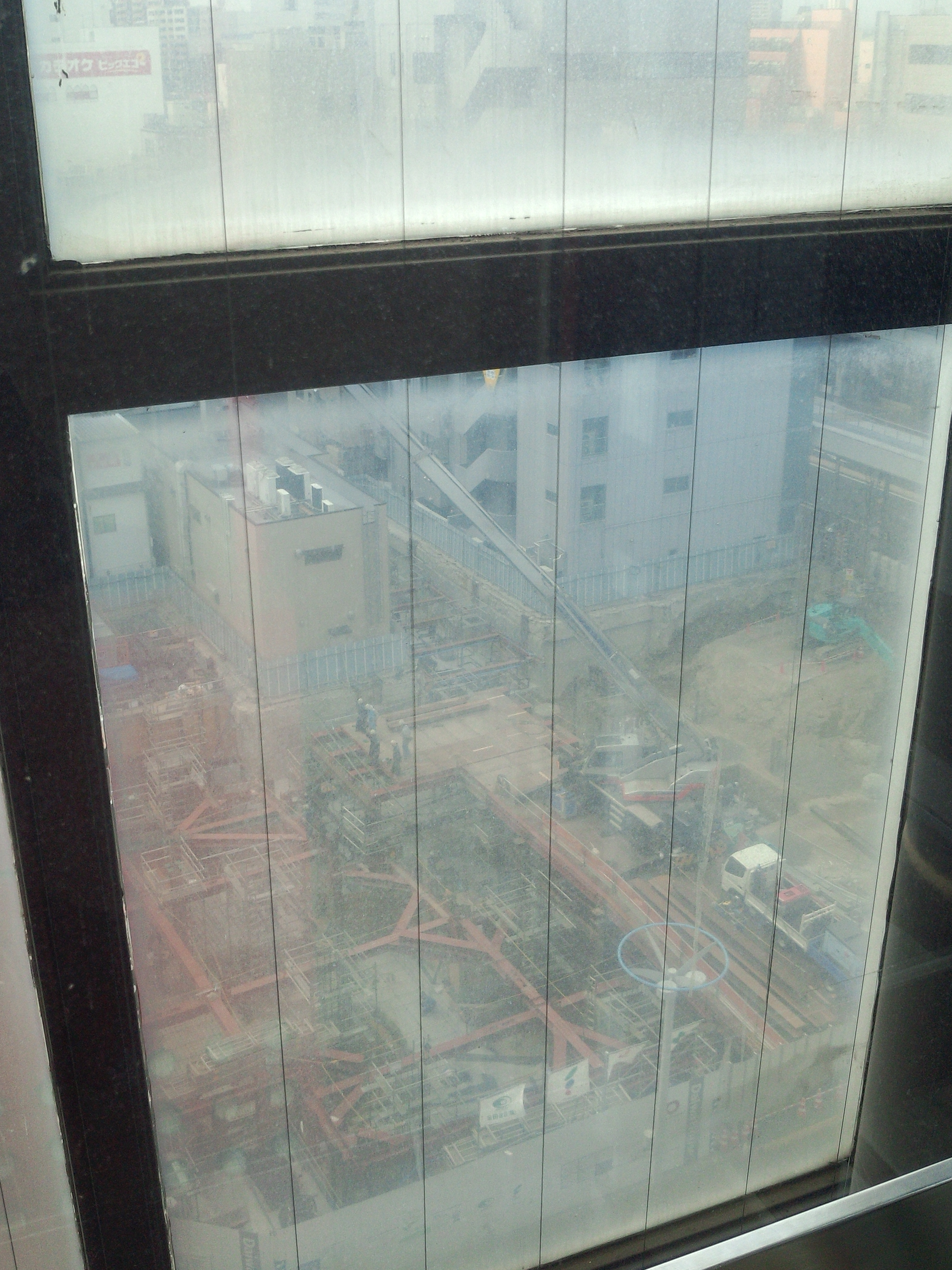 アティ郡山 エレベーター内より撮影（2015年10月撮影）